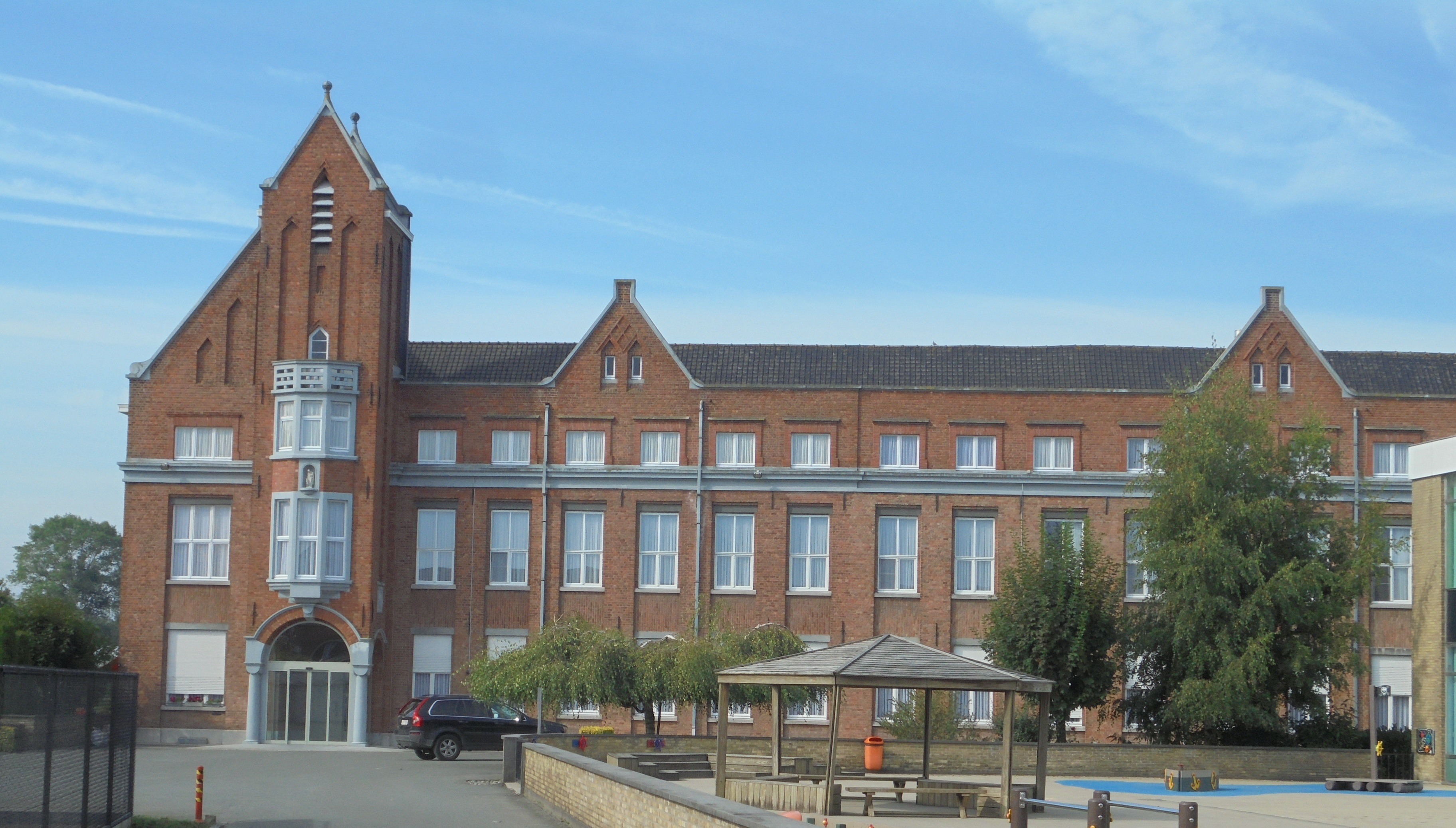 Moederklooster der zusters Sint-Vincentius à Paulo - Gitsbergstraat - Gits - Hooglede - West-Vlaanderen - België